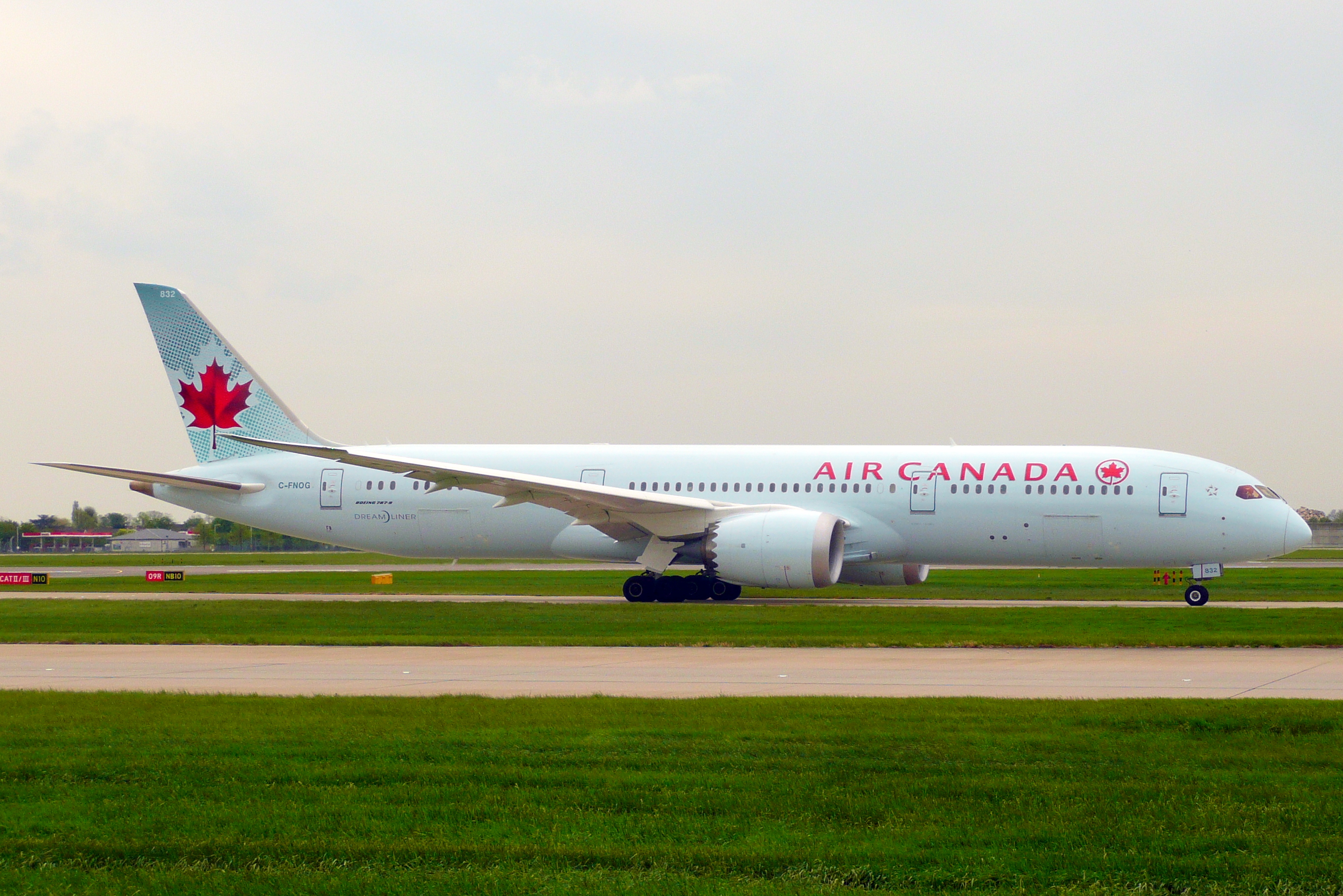 C-FNOG 07052016LHR